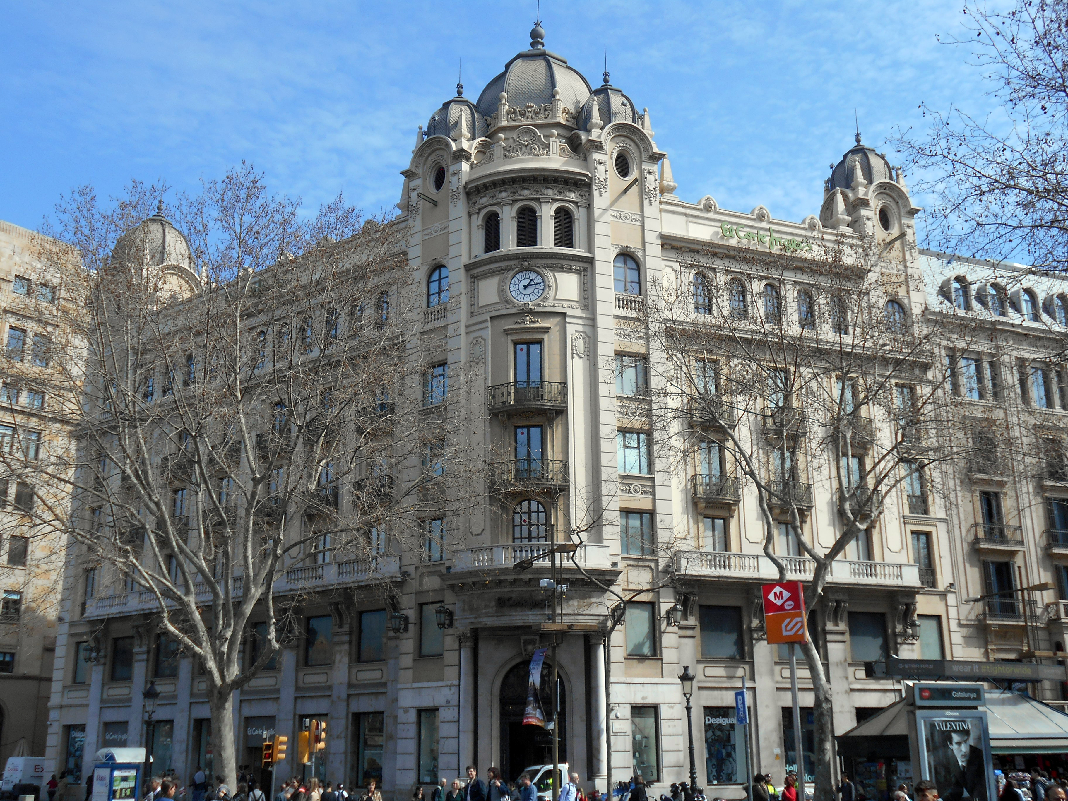 Banca Arnús, de Enric Sagnier, plaza de Cataluña, Barcelona.